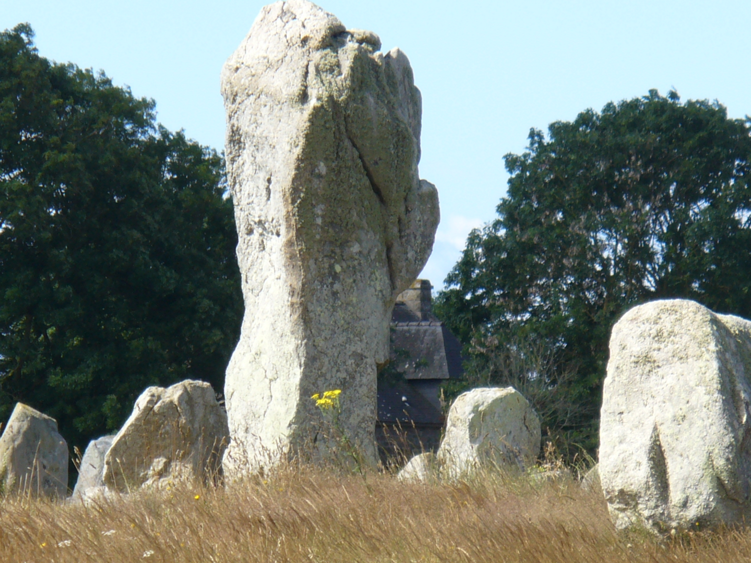 1099 Menhire,bis zu 4 Meter hoch,von Ost nach West in 1167 Meter Langen Alignements(Steinreihen) in einem Halbkreis(Cromlechs) endend. (Jungsteinzeit, Neolithikum ,Neolithic ,Néolithique 4500-2300 v.Chr.) Megalithanlage von Le Ménec, Carnac ,Departement Morbihan ,Bretagne